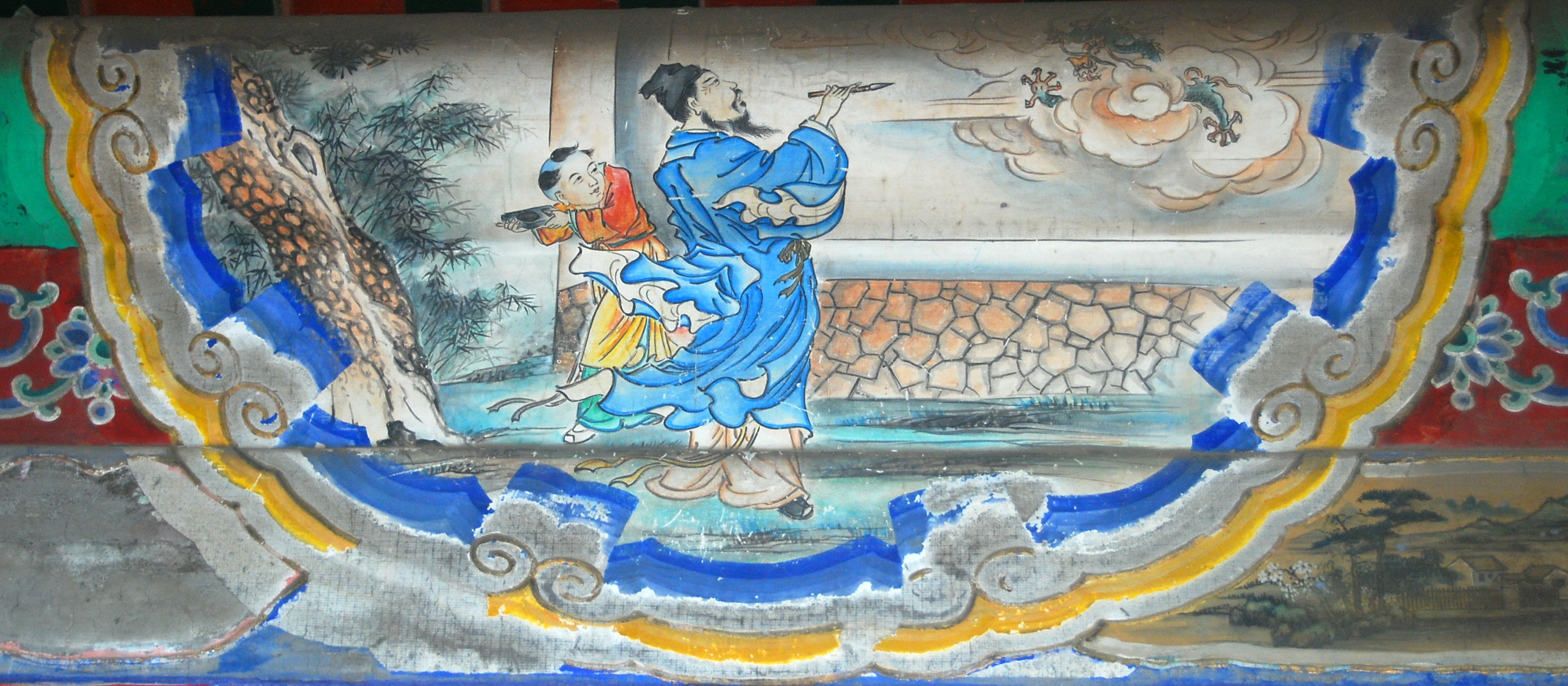 颐和园长廊上的彩绘：画龙点睛（仿巢子馀作品绘制）